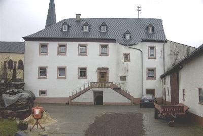 Gutshof in Hersdorf im August 2003